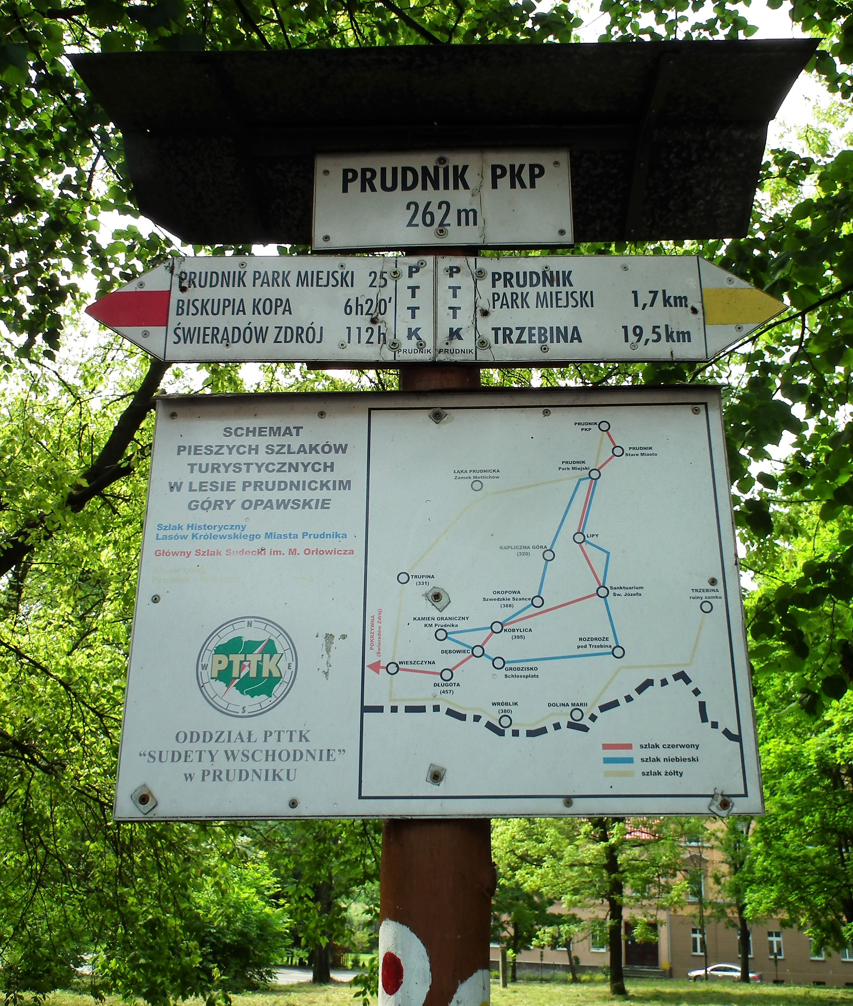 Początek Głównego Szlaku Sudeckiego w Prudniku, na dworcu kolejowym.